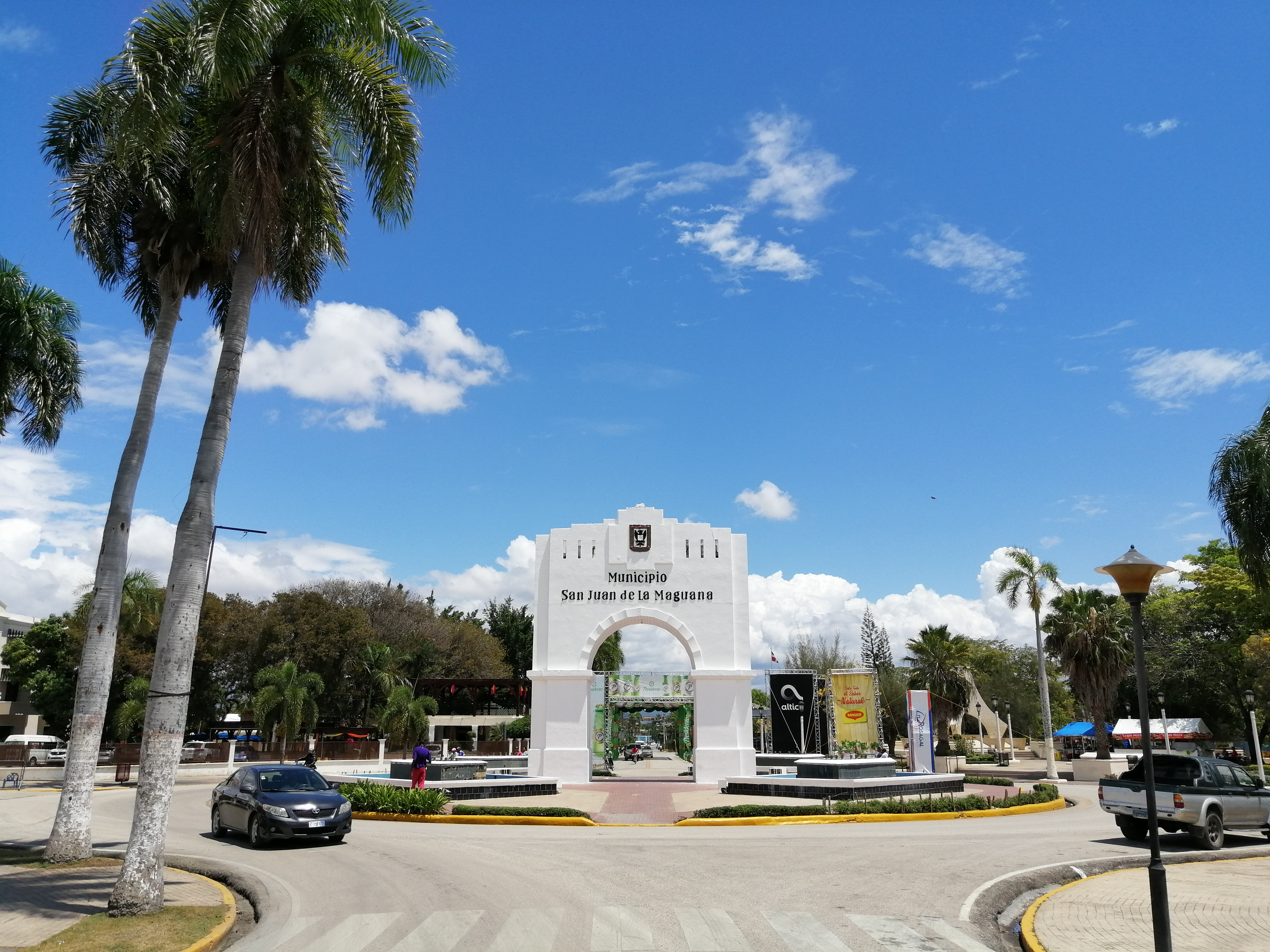 Triumphbogen (Arco del triunfo)